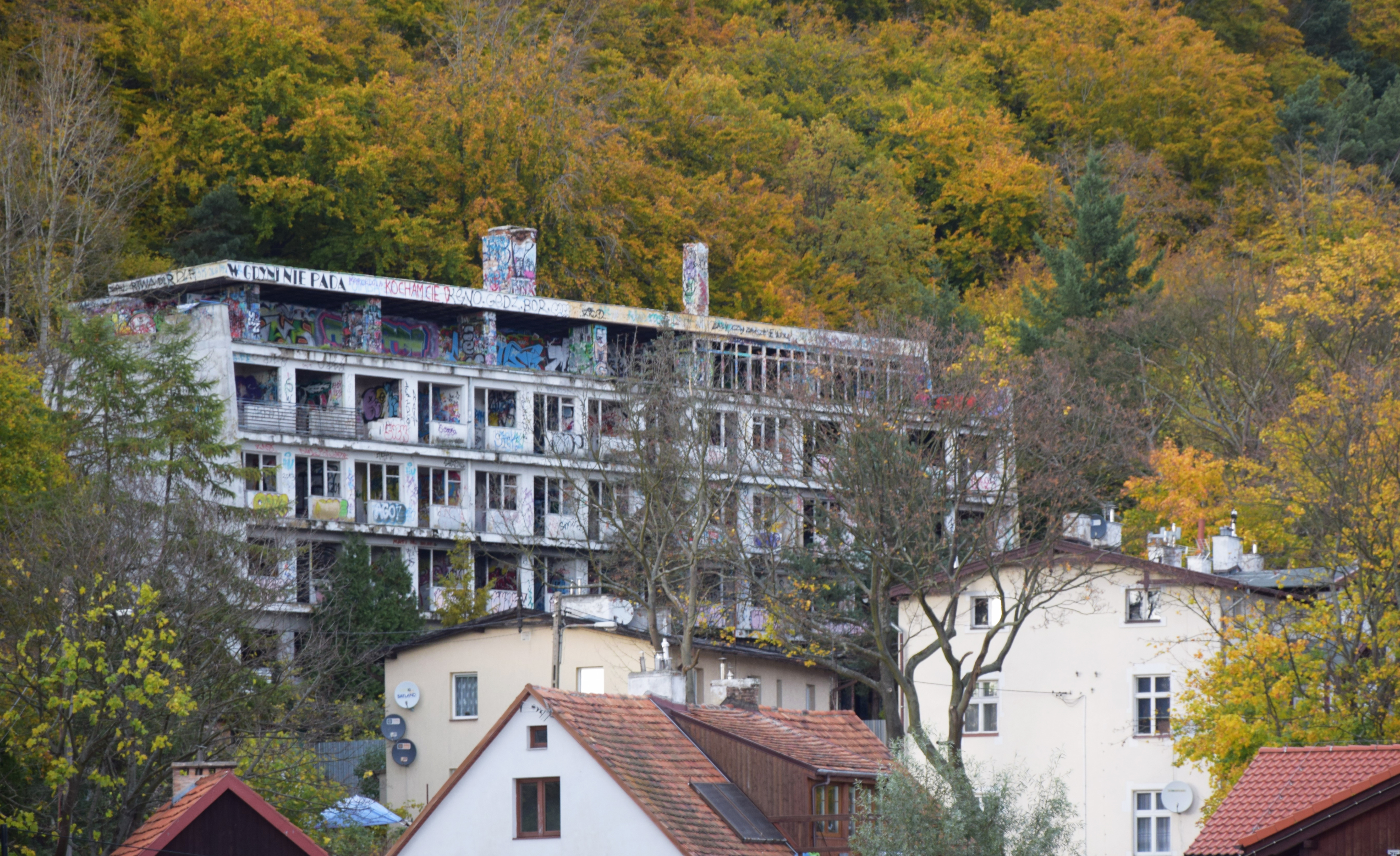 Budynek opuszczonego sanatorium w Gdyni Orłowie